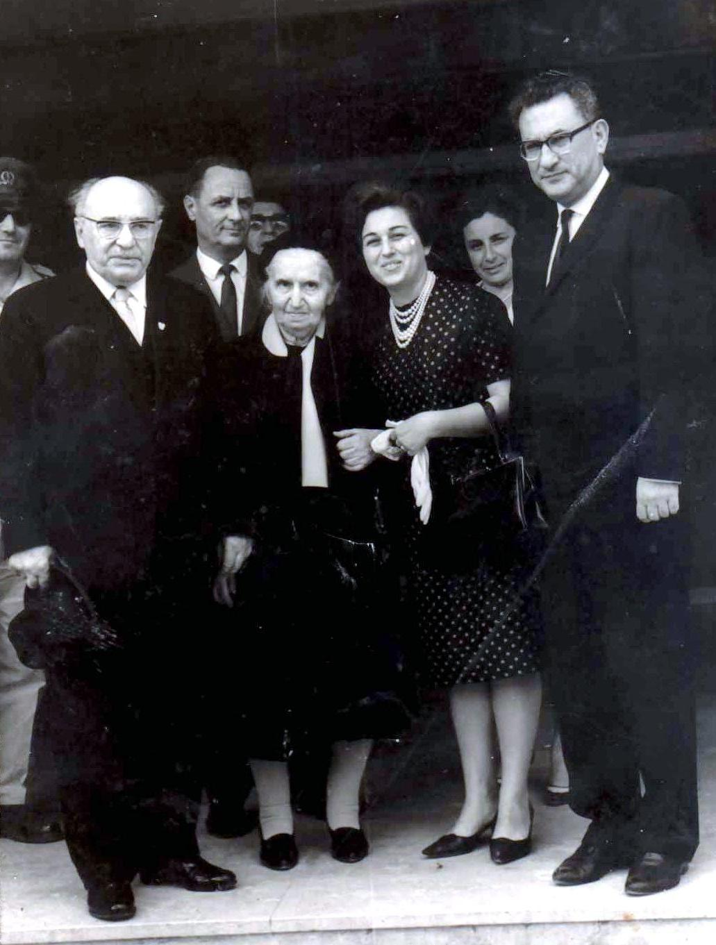 ביקור הנשיא זלמן שזר ברחובות. בתמונה עם רעייתו רחל שזר, עם יצחק וניצה כץ. מאחור - הממונה על מחוז הדרום גוברניק